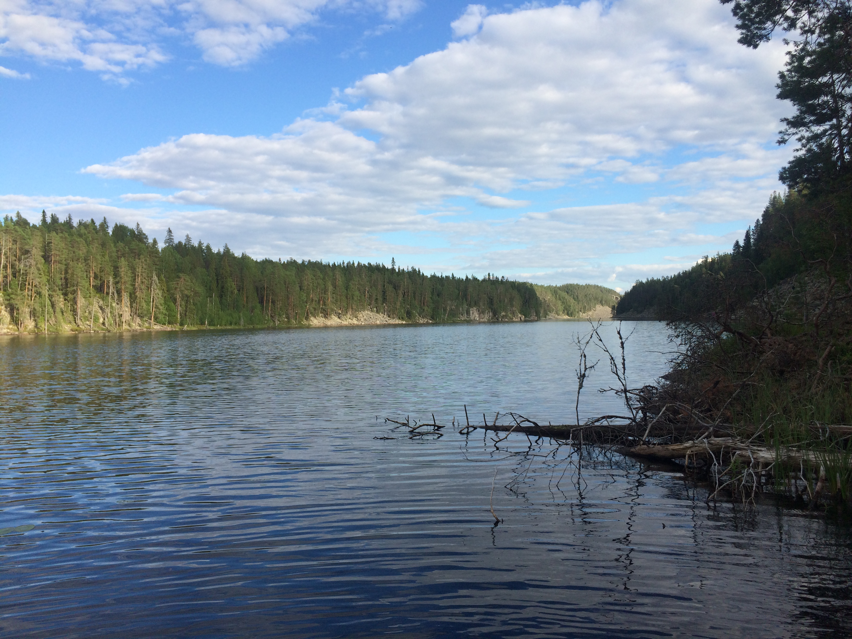 озеро Пизанец